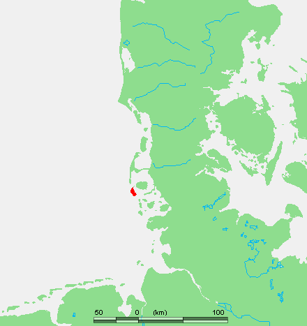 Wadden - Amrun.PNG